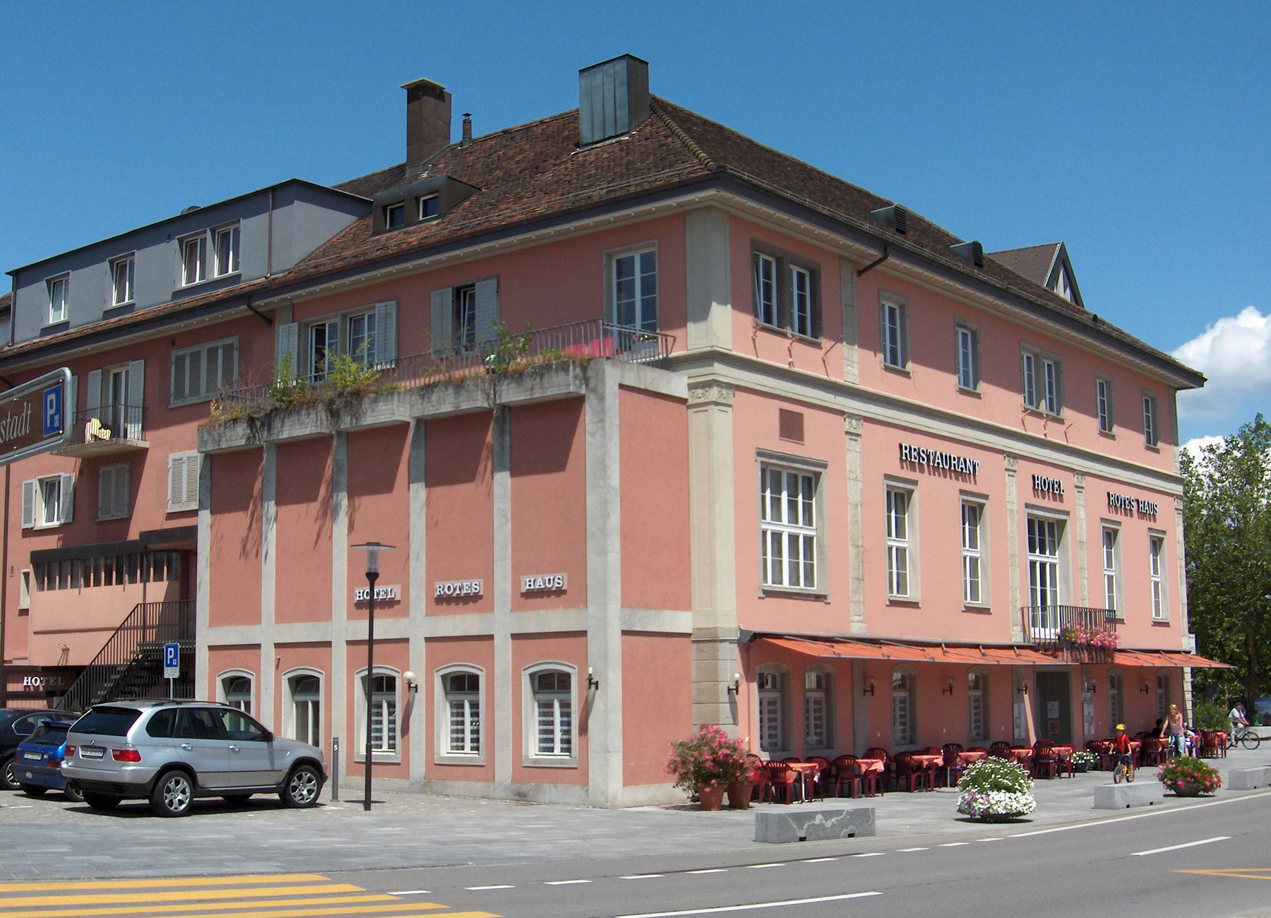 Rotes Haus in Brugg Fotografiert durch Voyager, 28. Juni 2006